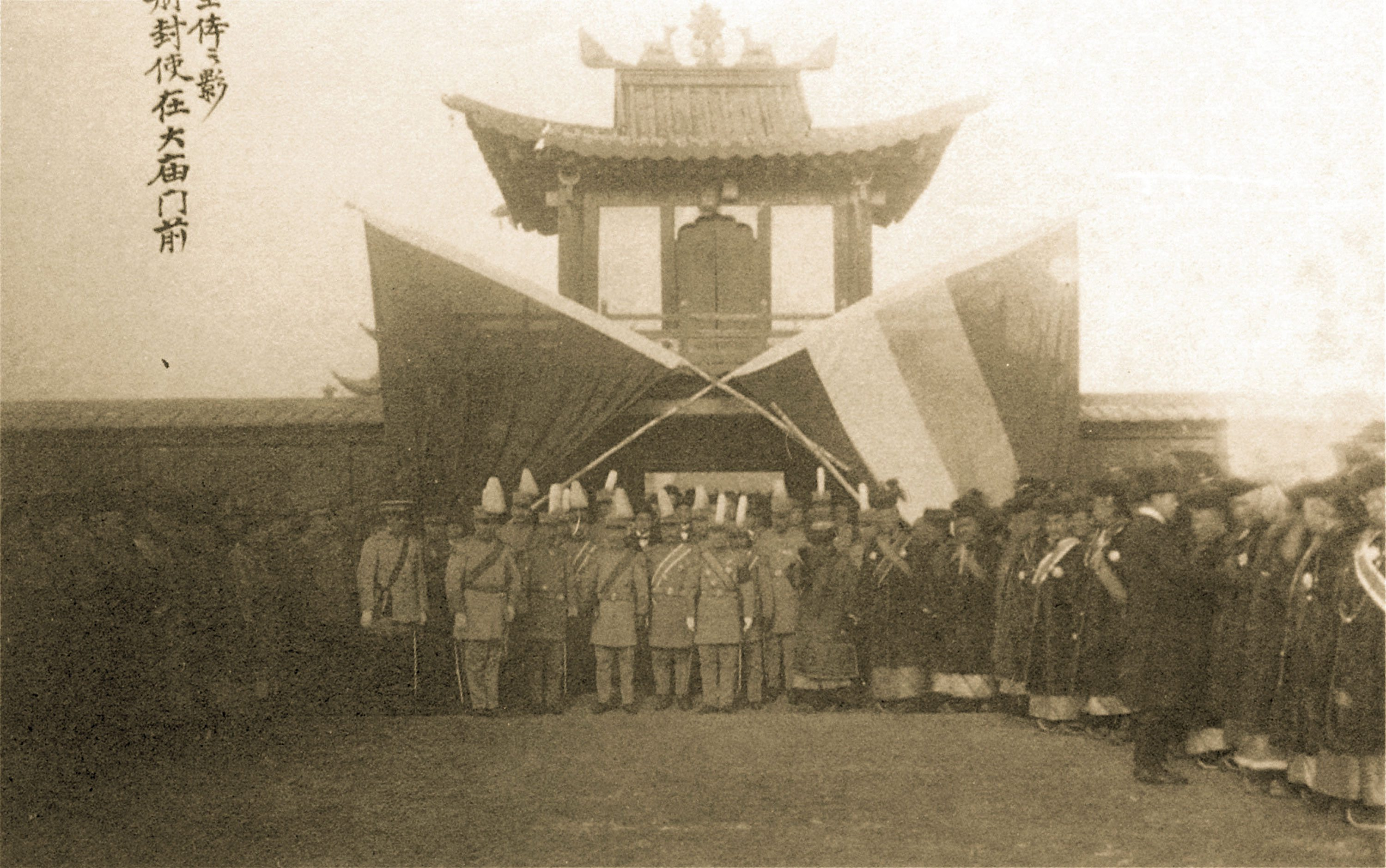 1920年1月1日，外蒙活佛冊封專使徐樹錚（前排中立臂帶黑圈者）為哲布尊丹巴八世舉行冊封典禮。圖為徐樹錚與其隨員以及外蒙上層人士在庫倫大廟（博克多汗黄宮）前合影。 Монгол: Сю Шүжан Монгол ноёдын хамт. Нийслэл Хүрээ. 1920 оны 1 сар.